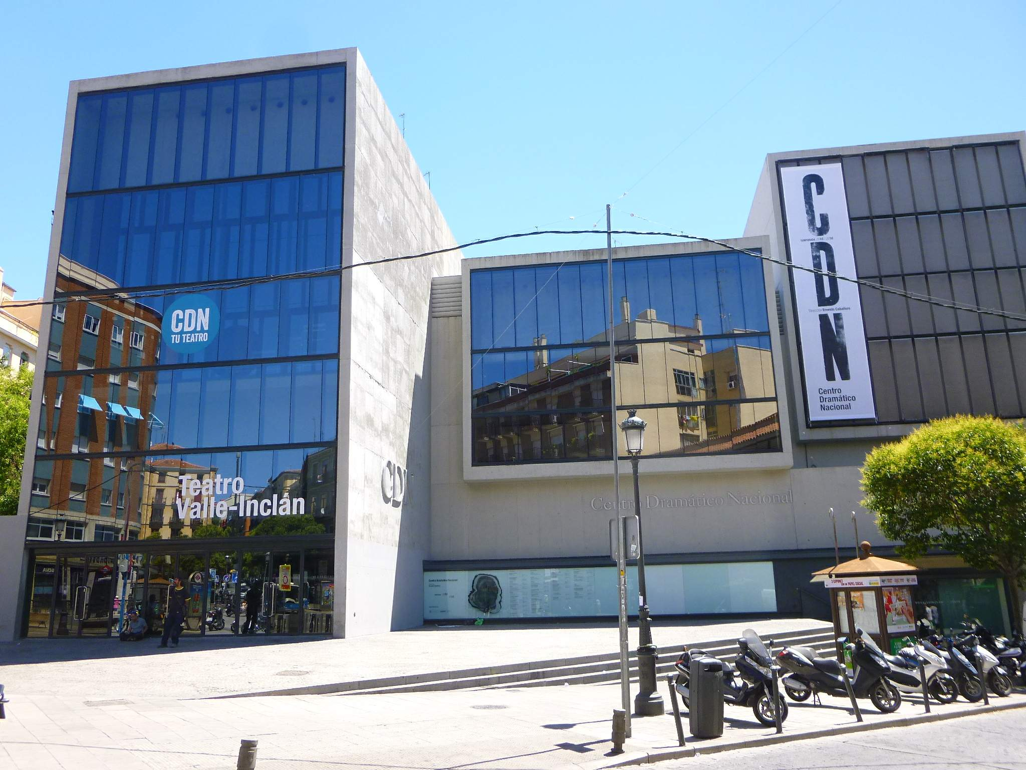 Madrid - Teatro Valle-Inclán-Centro Dramático Nacional (CDN)